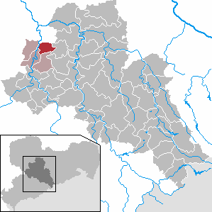 Zettlitz in Saxony - district Mittelsachsen